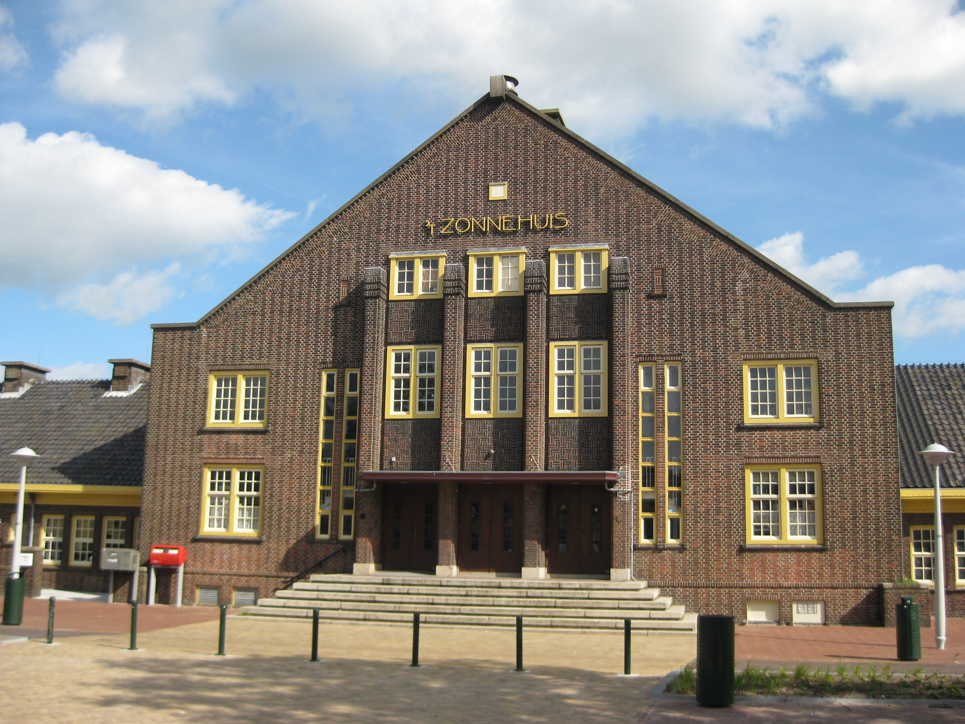 Zonnehuis op het Zonneplein in Amsterdam-Noord (Tuindorp Oostzaan)